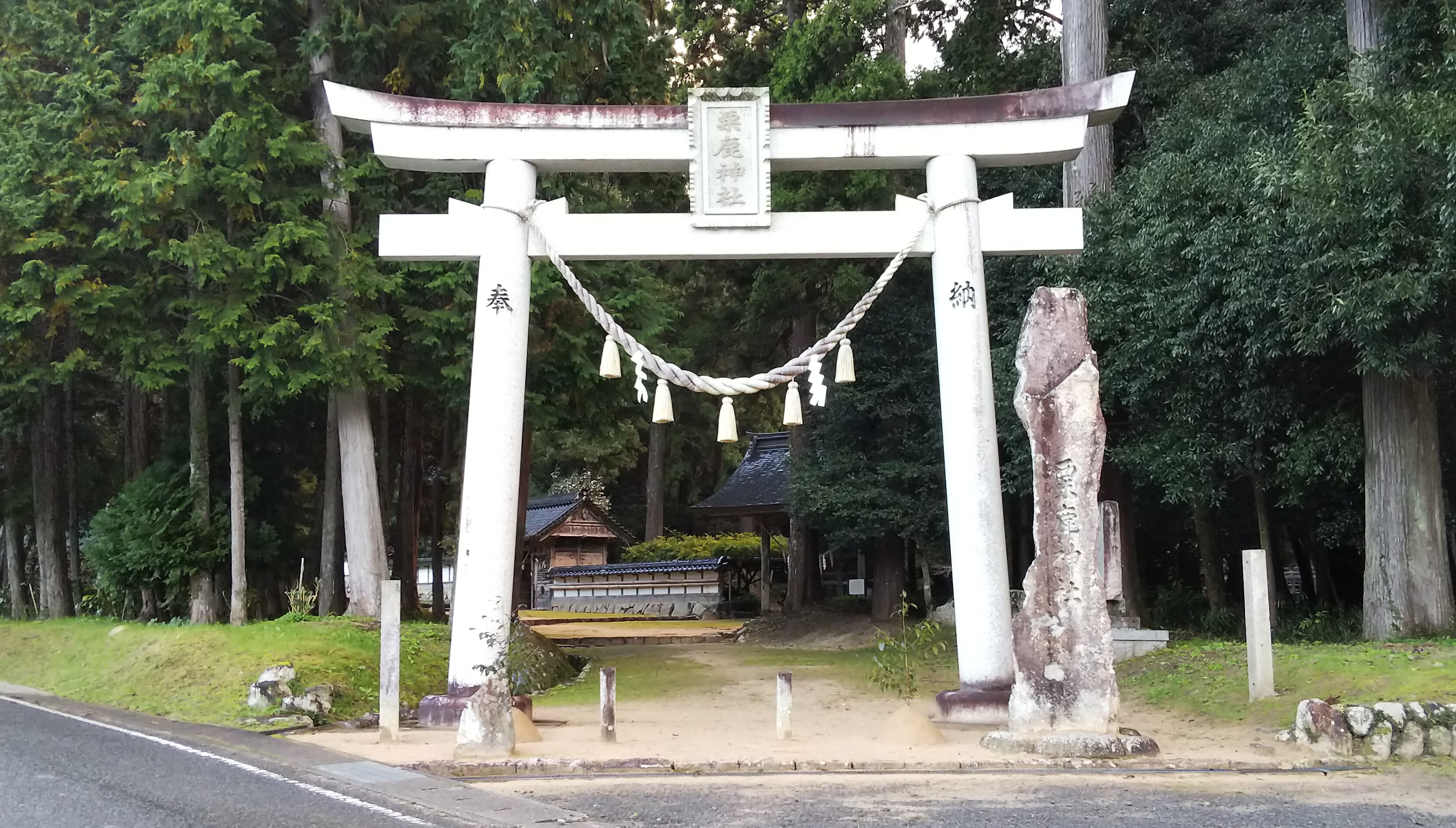 粟鹿神社鳥居